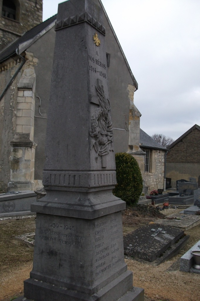 Monumentaux morts de Les Meneux.